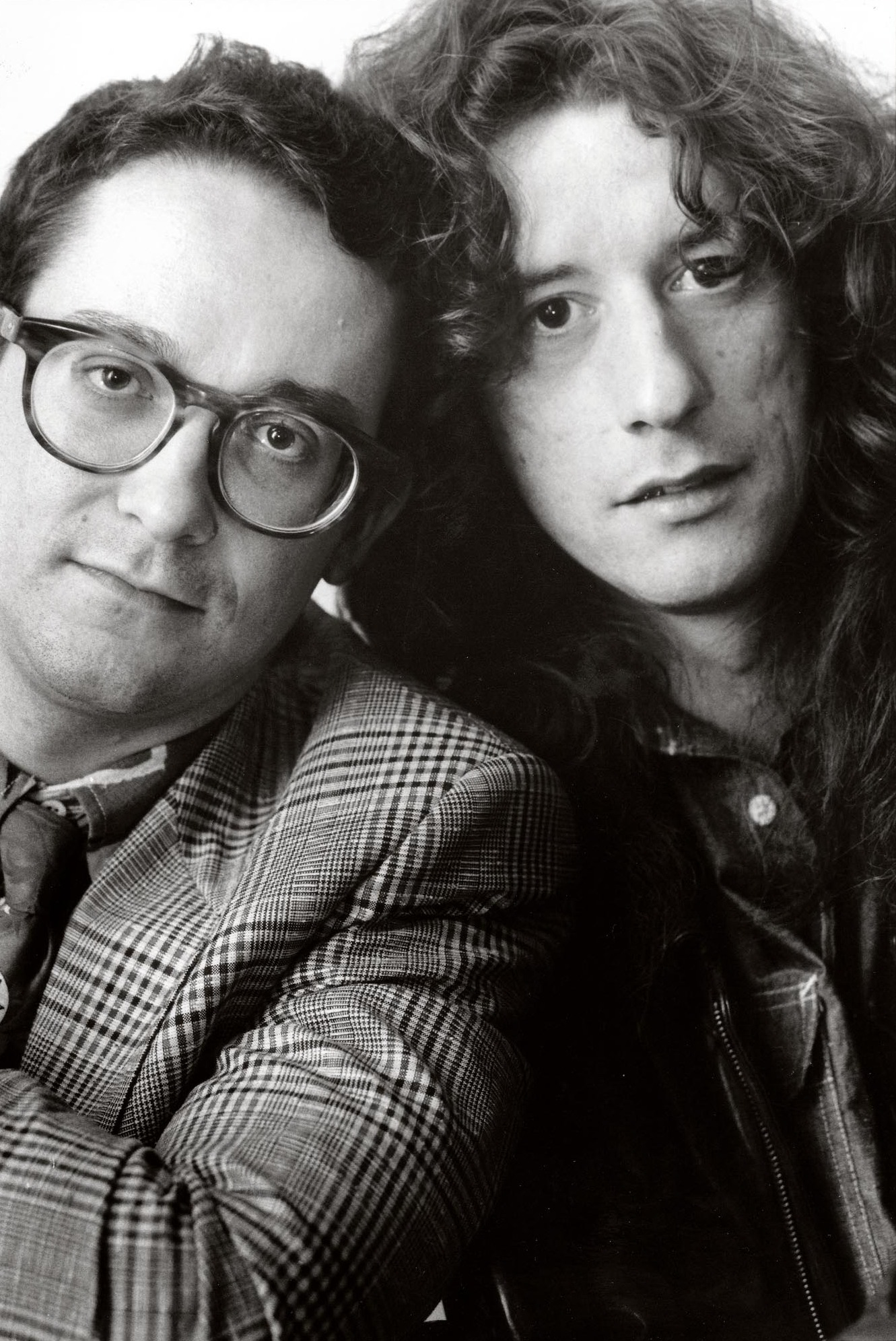 Tom Lanoye en Herman Brusselmans, beide Vlaams schrijver.